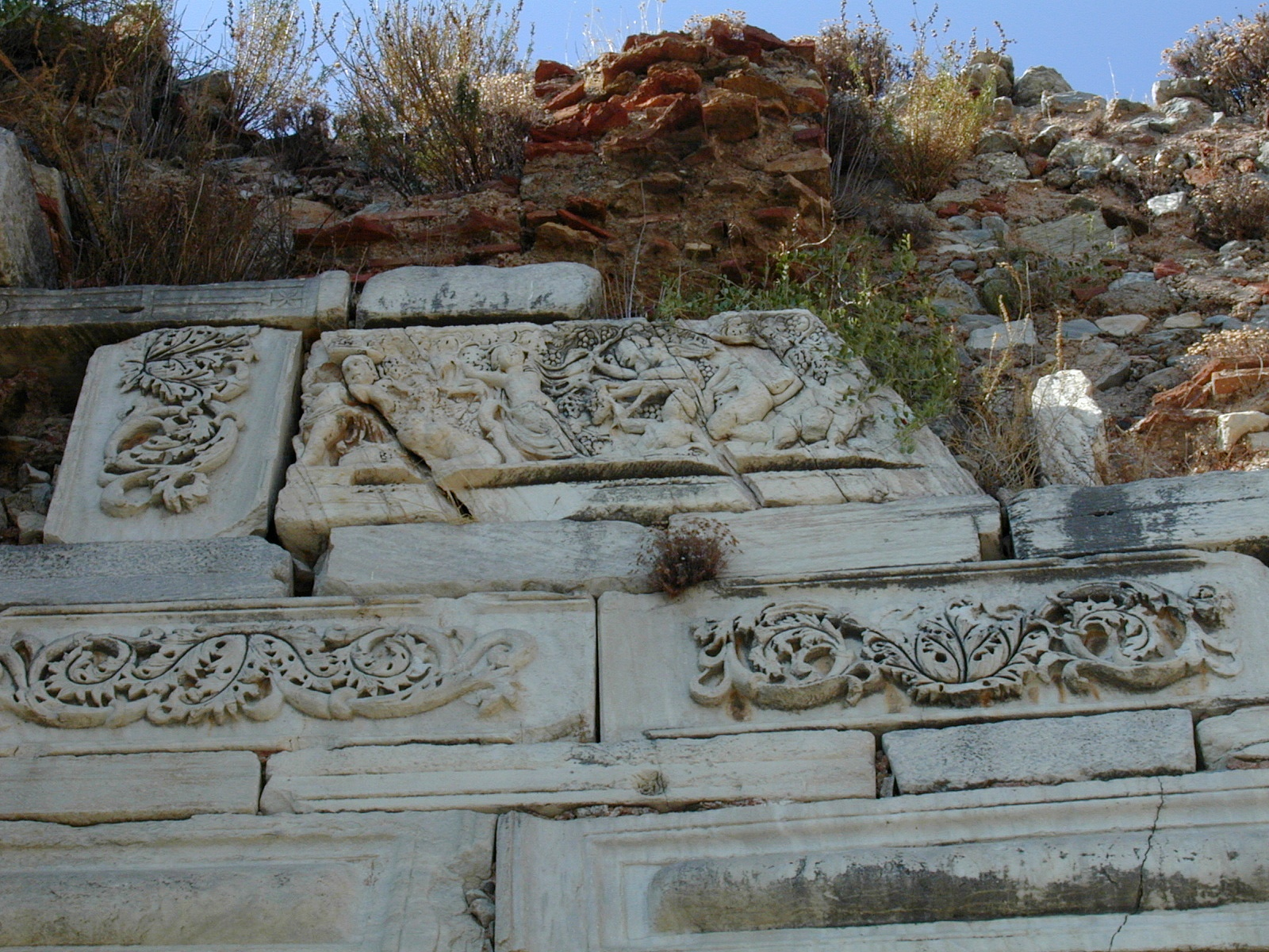 Détail de la Porte dite des Persécutions à Saint-Jean d'Éphèse, sarcophage avec le thème Drunken Dionysos and a vintage with erotes.